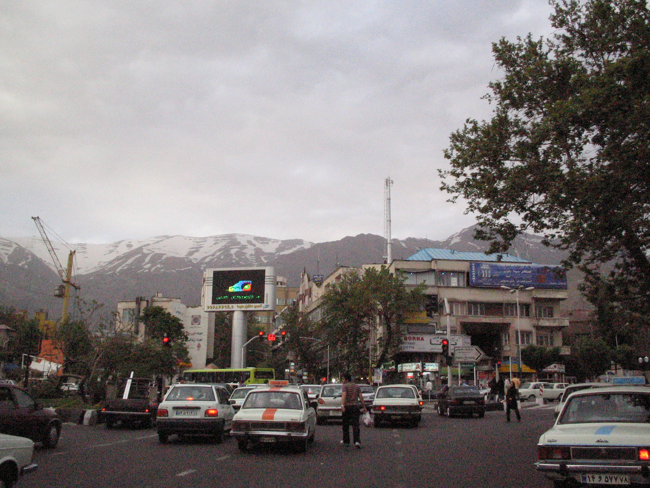 Meidan-e Qods, Tajrish, Tehran, Iran.